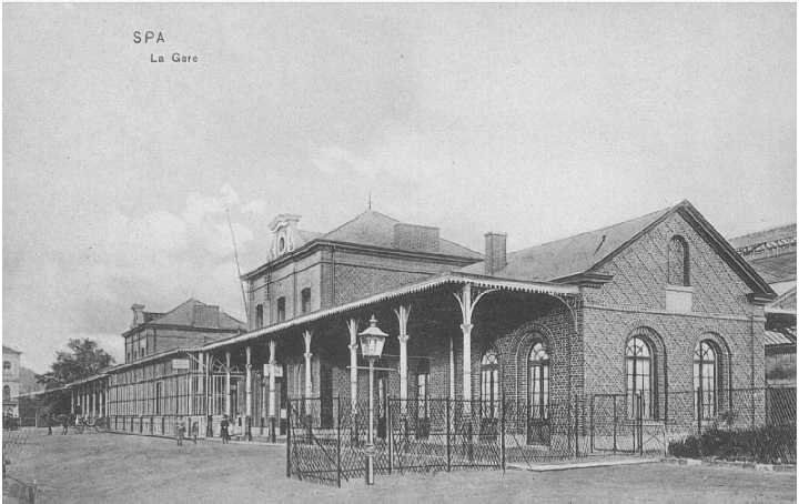 Gare de Spa 1900